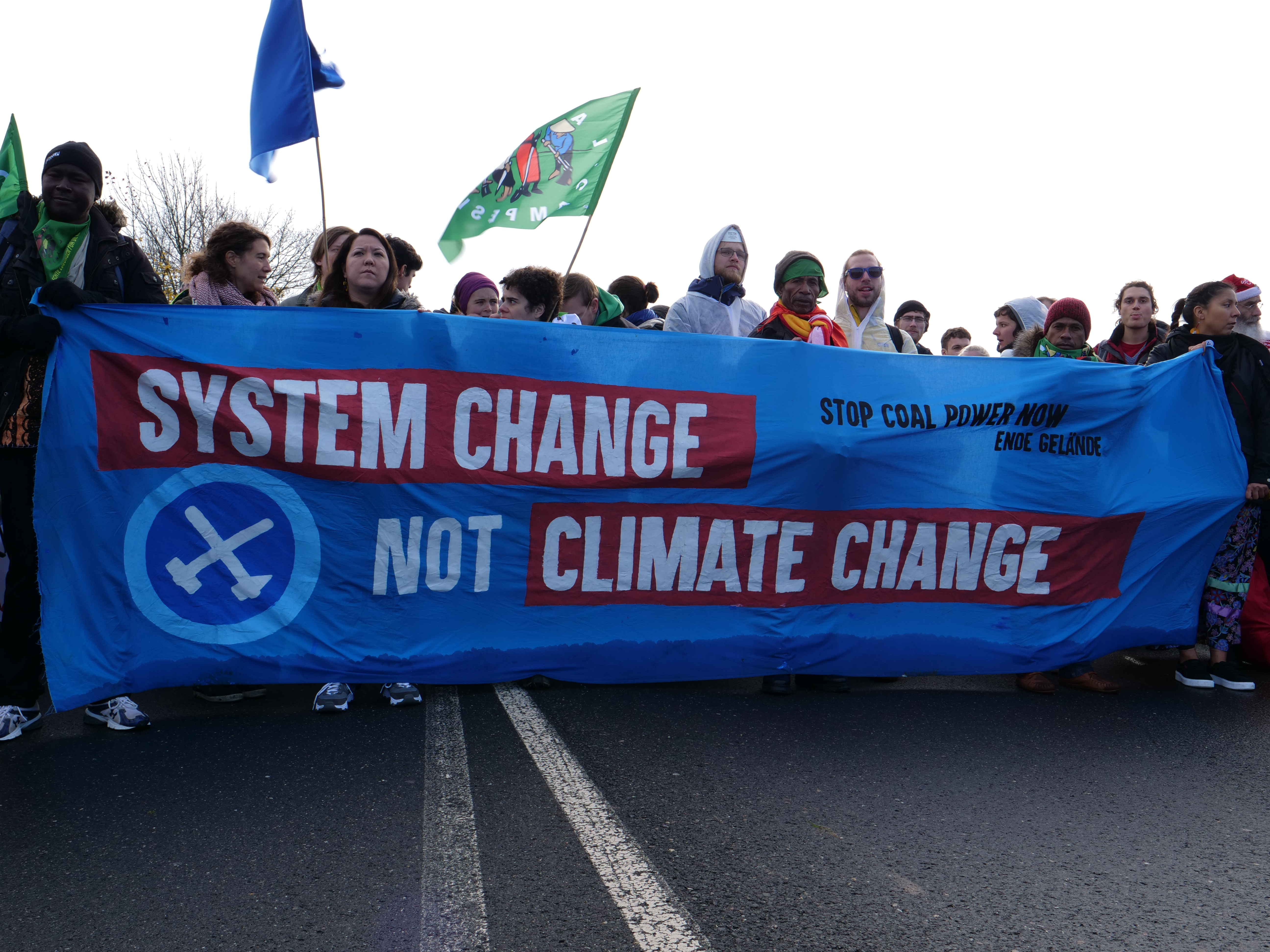 Ende Gelände 2017: Front-Banner ("System change, not climate change – Stop coal power now") der Ende-Gelände-Demo hinter Buir (Kerpen).